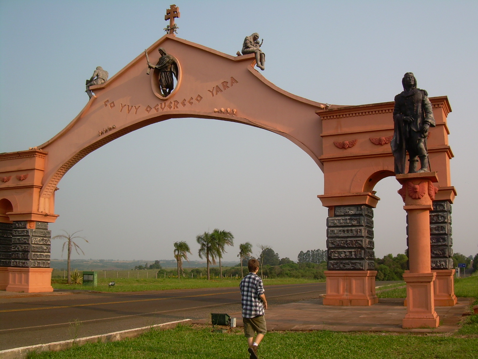 Pórtico de entrada de São Miguel das Missões, Rio Grande do Sul.